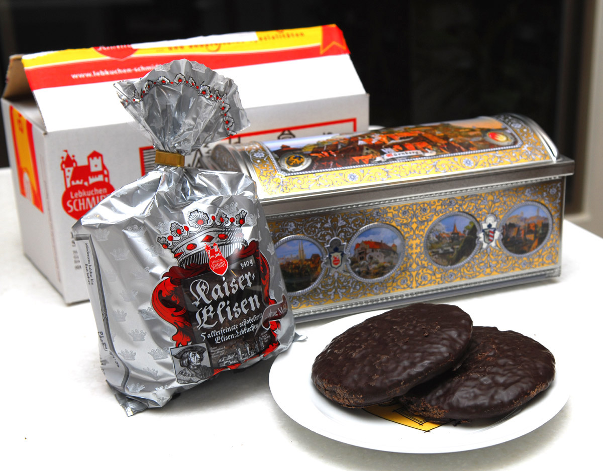 Lebkuchen，德式薑餅